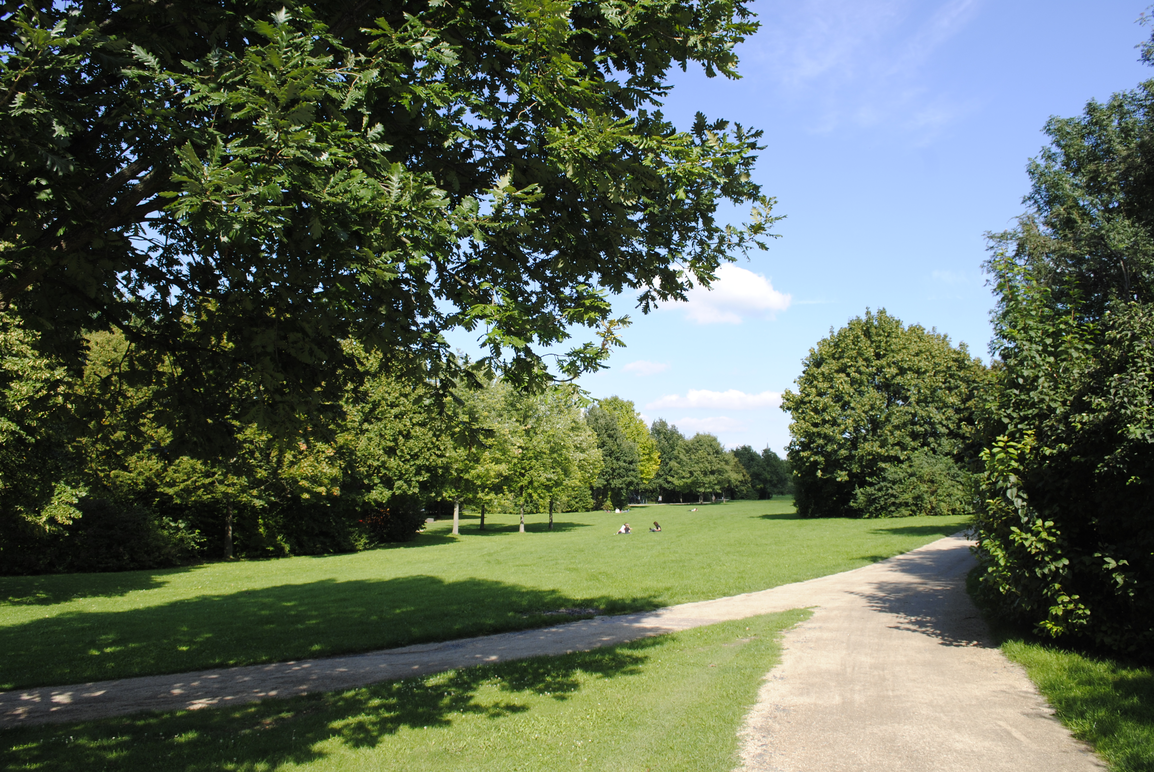 Der Sinaipark im Frankfurter Stadtteil Dornbuscg